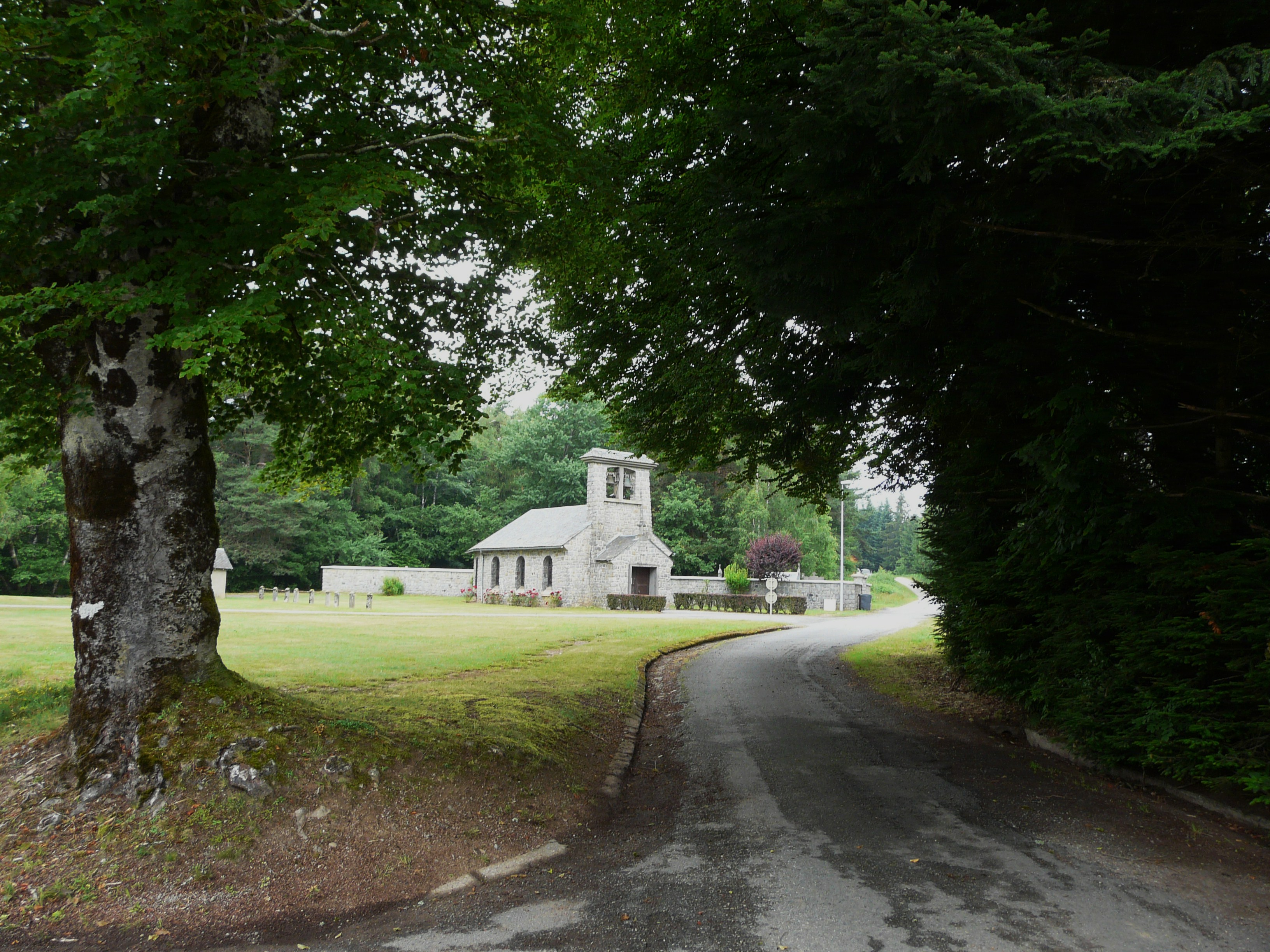 La place principale du village de Confolent-Port-Dieu, Corrèze, France.